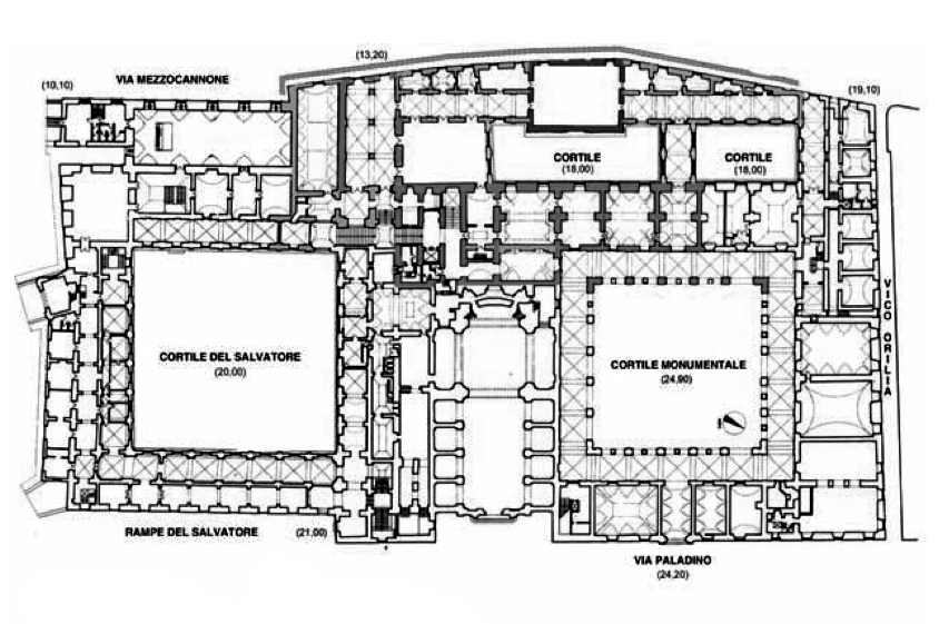 Napoli - Pianta del Complesso Casa del Salvatore (ex Collegio dei Gesuiti) con Chiesa del Gesù Vecchio. Oggi sede di varie facoltà universitarie e della Biblioteca Universitaria.